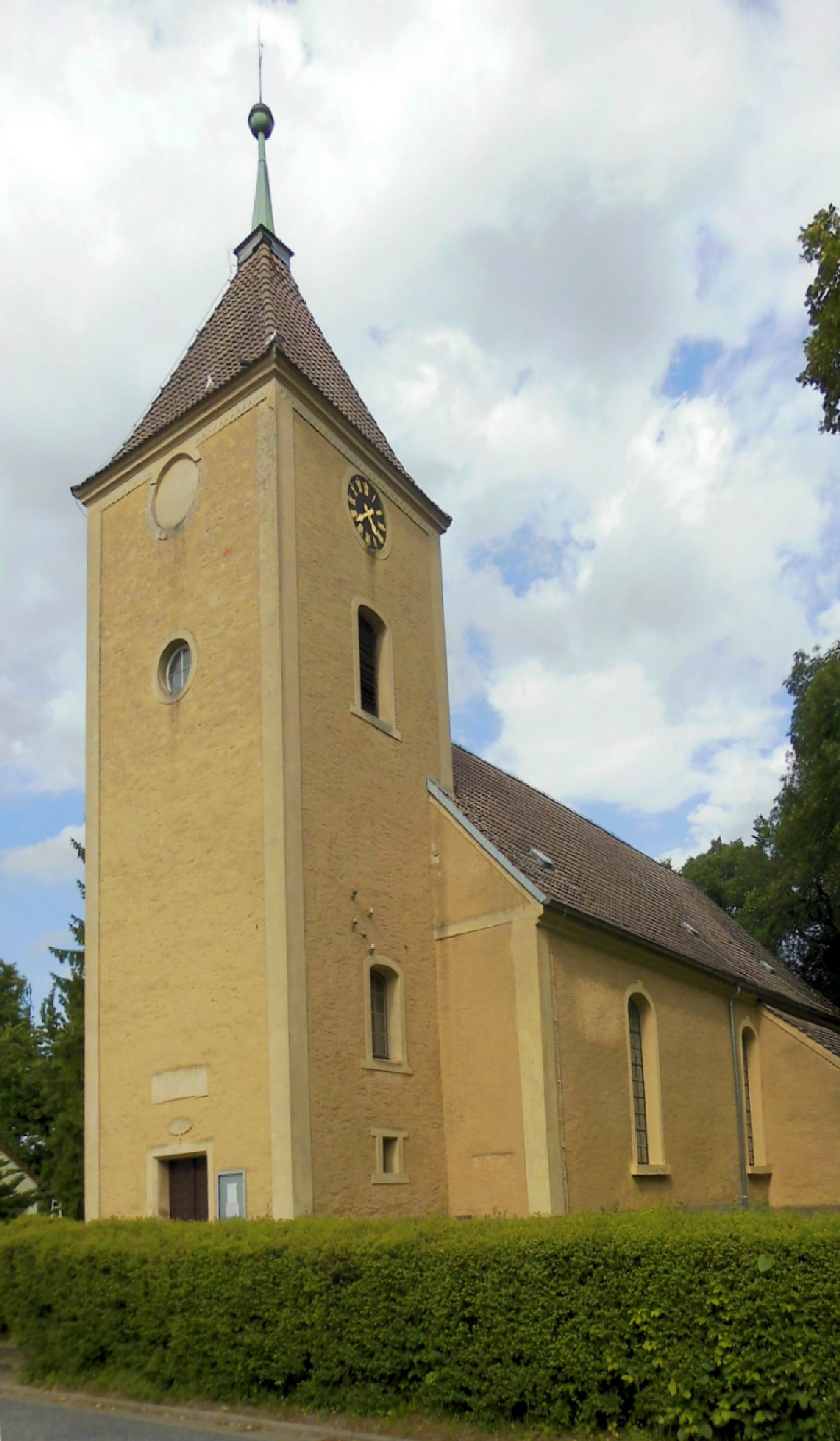 Dorfkirche in Bomsdorf, Gemeinde Neuzelle, Landkreis Dahme-Spreewald, Deutschland